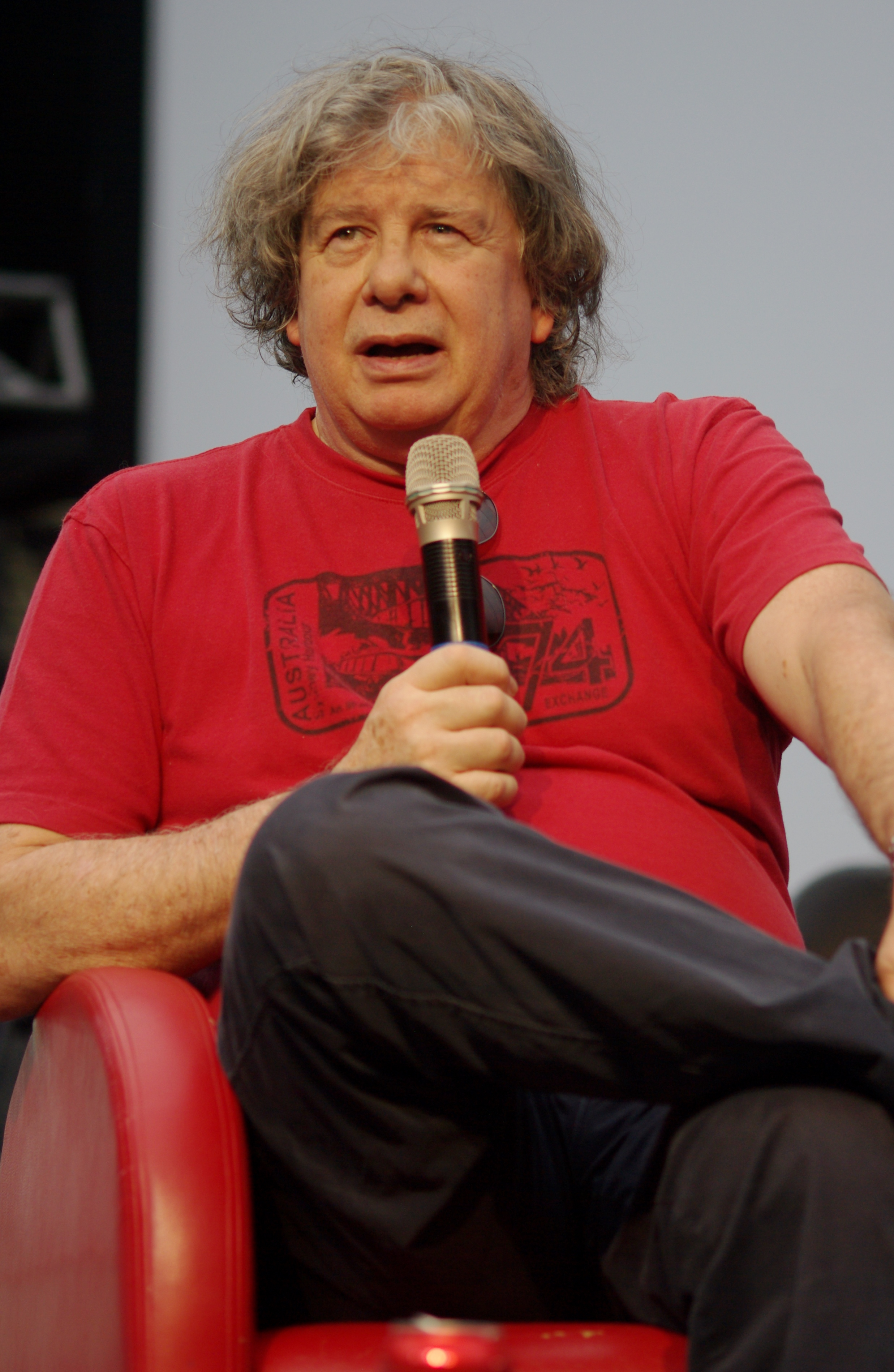 El escritor chileno Fernando Villegas en la primera Feria del Libro de Vitacura; Casas de Lo Matta, 24 de abril de 2015